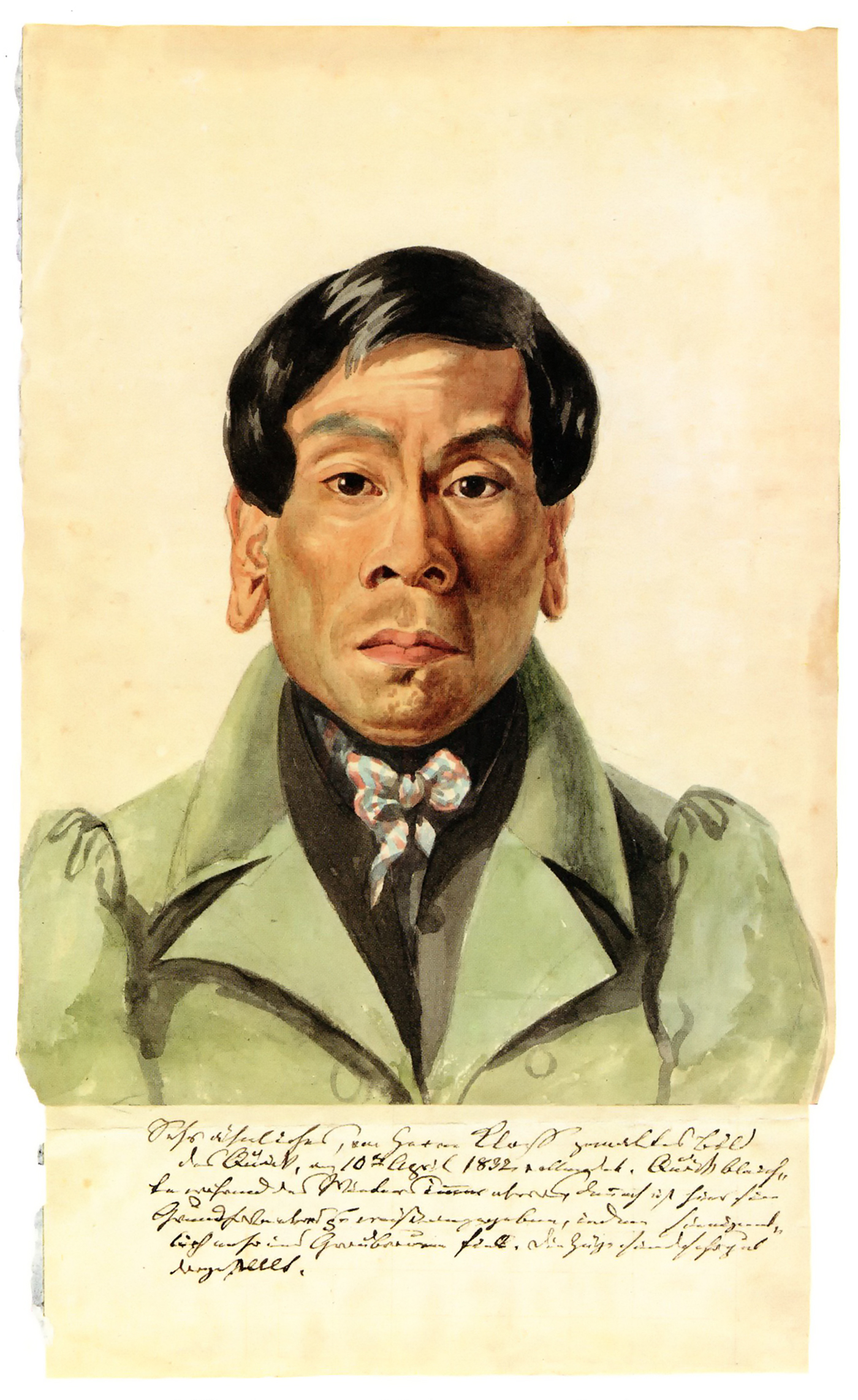 Der Botokude-Indianer Joachim Quäck (Quäck = portugiesisch: Kuêk, ursprünglich: Nuguäck) (* vermutlich um 1800 im brasilianischen Bundesstaat Minas Gerais in Brasilien; † 1. Juni 1834 in Neuwied) traf 1817 als Minderjähriger den deutschen Entdecker, Ethnologen, Zoologen und Naturforscher Prinz Maximilian zu Wied-Neuwied in Brasilien. Quäck wurde für Maximilian zum einheimischen Reisebegleiter, der ihm das für seine Forschungen notwendige Hintergrundwissen vermittelte. Maximilian ließ ihn nach Europa nachkommen. Am 12. Februar 1818 kam Quäck in Neuwied an. Dort arbeitete er für Maximilian als dessen persönlicher Kammerdiener. Quäck verstarb im Alter von 34 Jahren am 1. Juni 1834 um 9 Uhr morgens an einer Leberentzündung und wurde am 3. Juni 1834 (vermutlich auf dem Alten Friedhof von Neuwied) katholisch beerdigt.